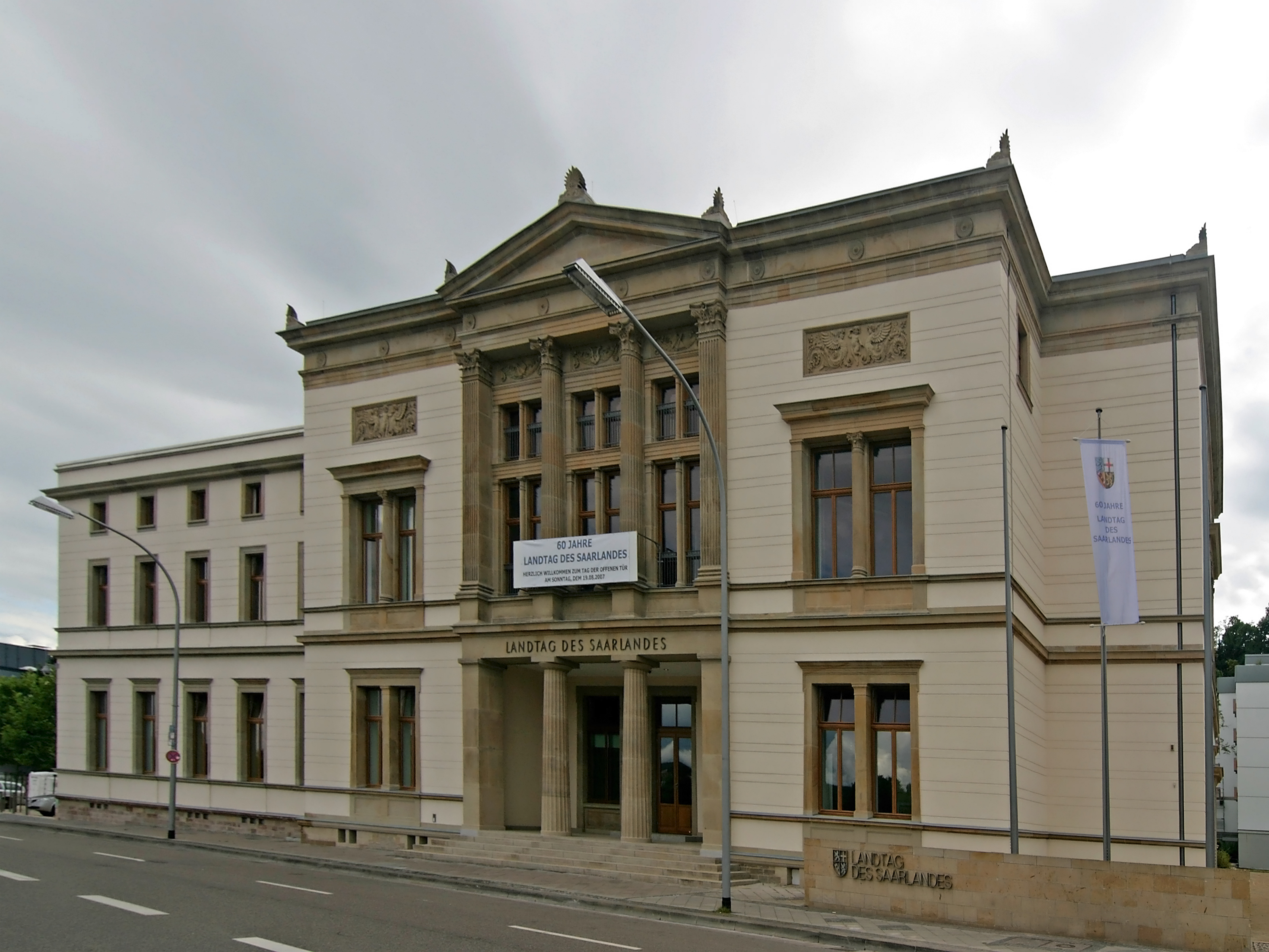 Landtag des Saarlandes in Saarbrücken. Der Bau wurde 1865/1866 für die Saarbrücker Casino-Gesellschaft durch den Architekten und Kölner Stadtbaumeister Julius Carl Raschdorff (1823-1914) errichtet, der unter anderem auch den Berliner Dom erbaute.